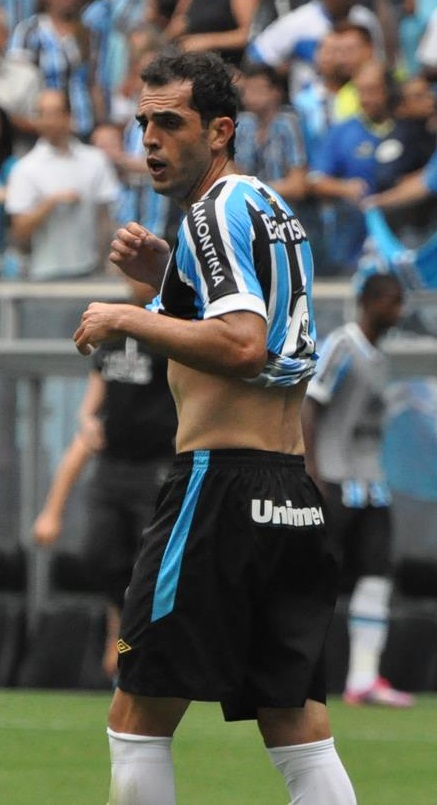 Rhodolfo atuando pelo Grêmio em partida contra a União Frederiquense pelo Campeonato Gaúcho de 2015.